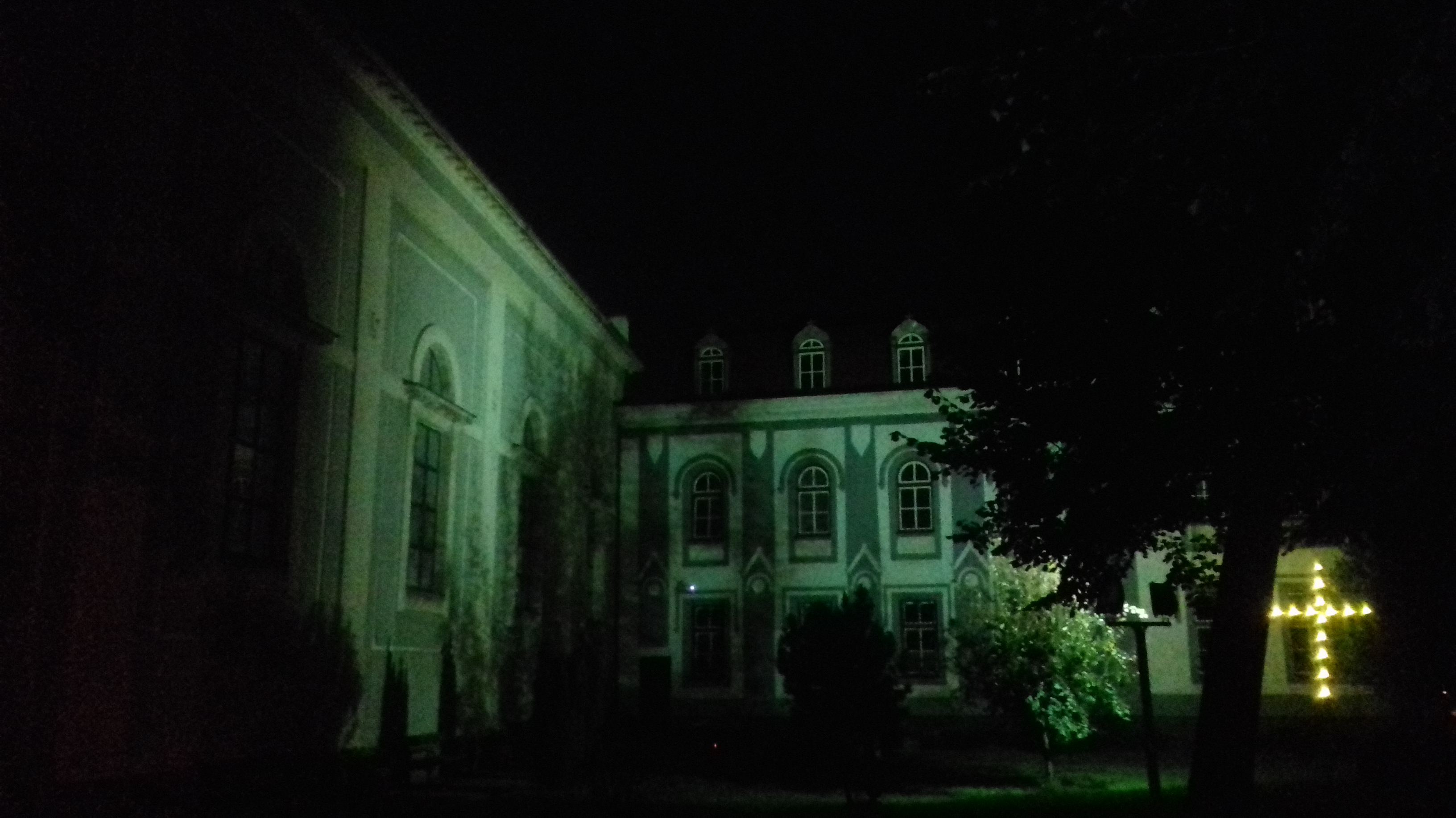 Крст и црква